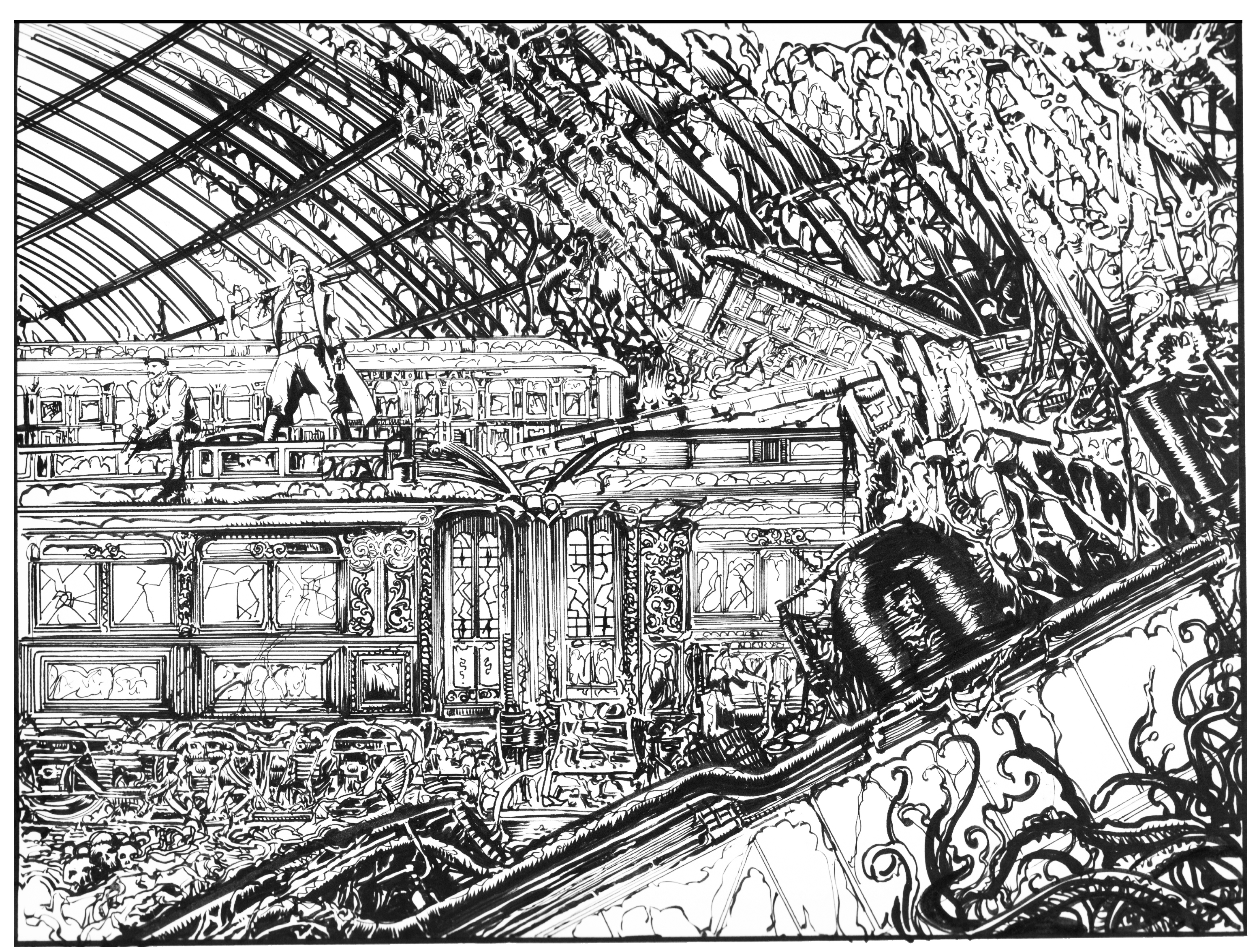 tavola inedita inchiostro di china su carta